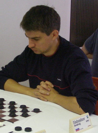 Venemaa kabetaja Andrei Kalmakov Sloveenias Bovecis 2006 Euroopa meistrivõistlustel rahvusvahelises kabes.